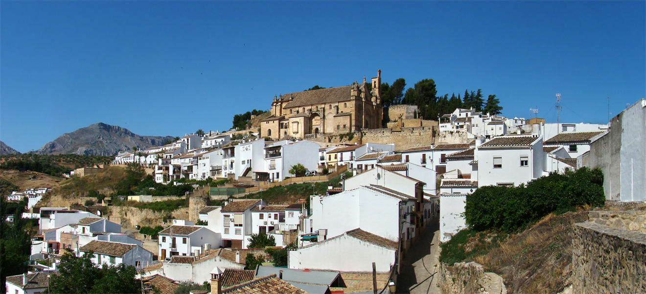 Real Colegiata de Santa María La Mayor, Antequera, Andalucía, España.